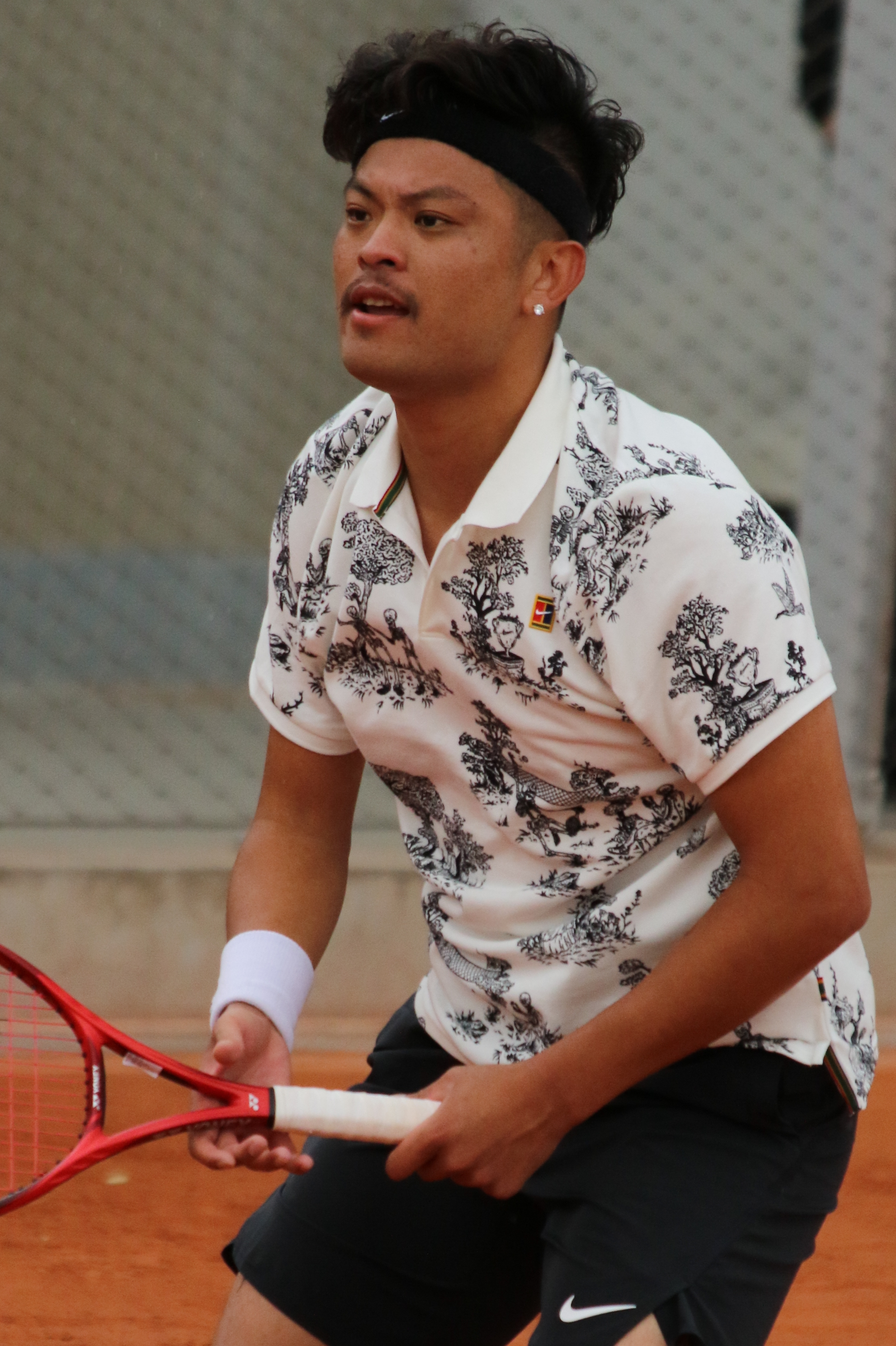 Hsieh RG19 (23)